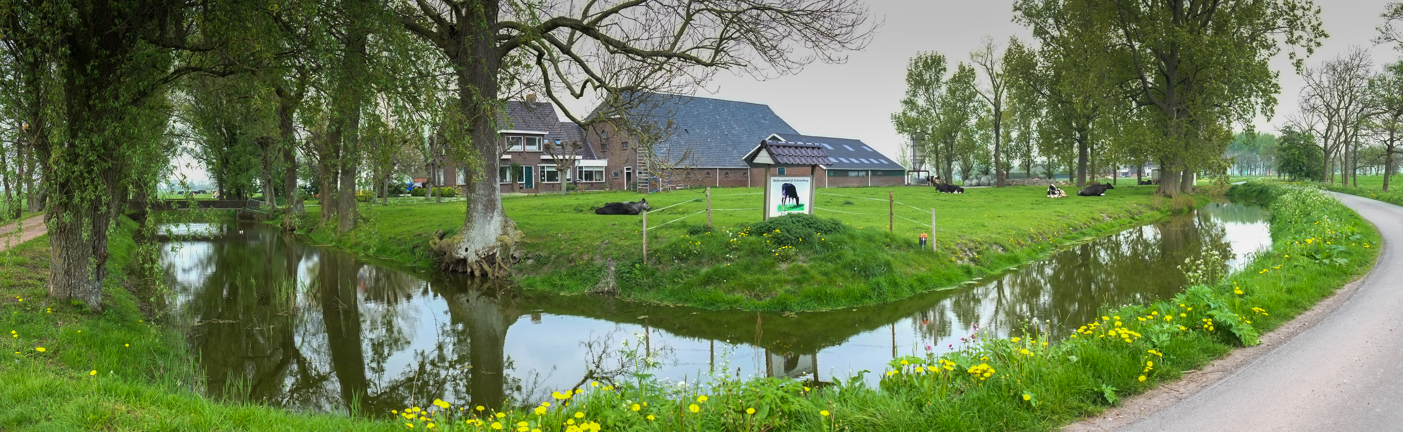 Boerderij Gravenburg